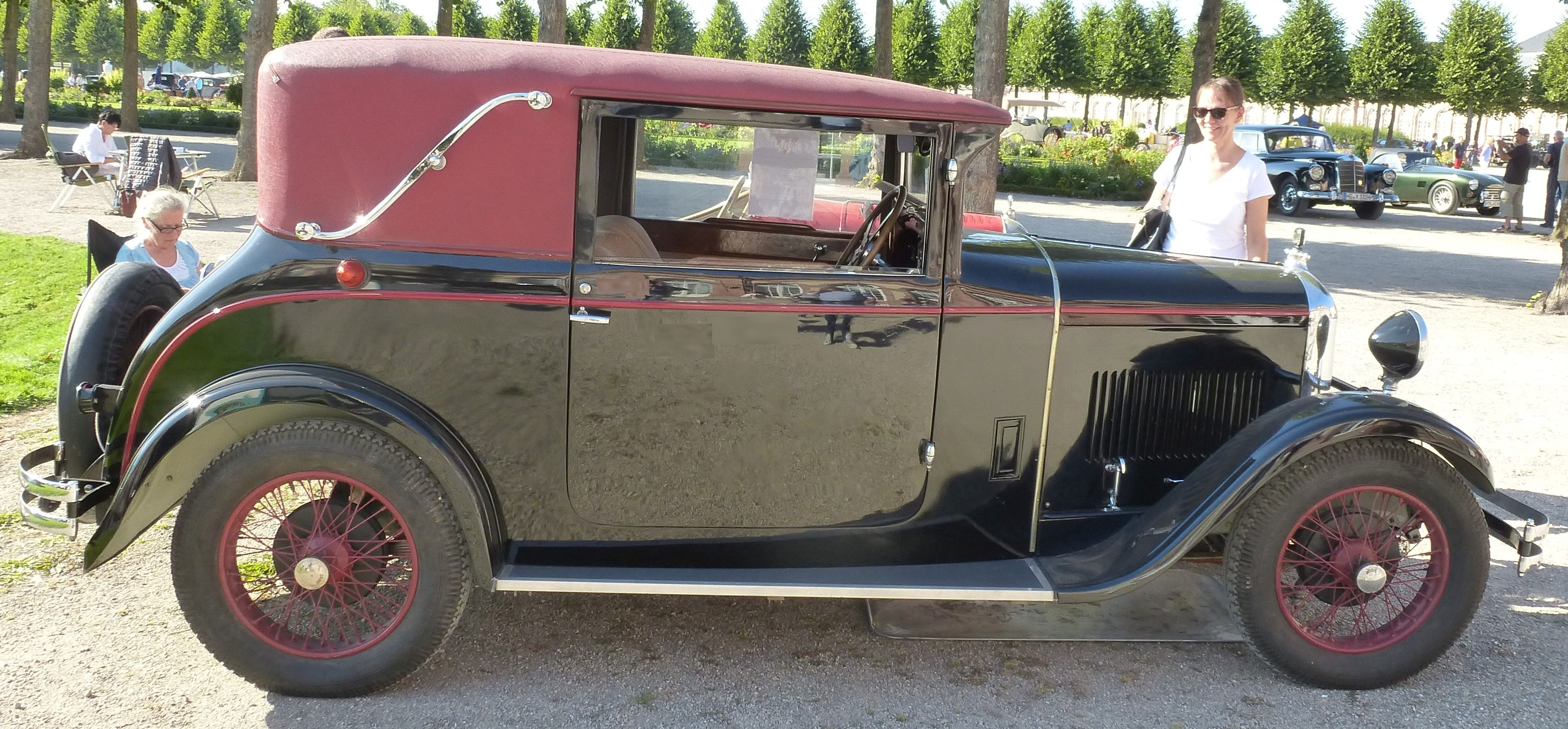 Amilcar Type M 2 Faux-Cabriolet 1930